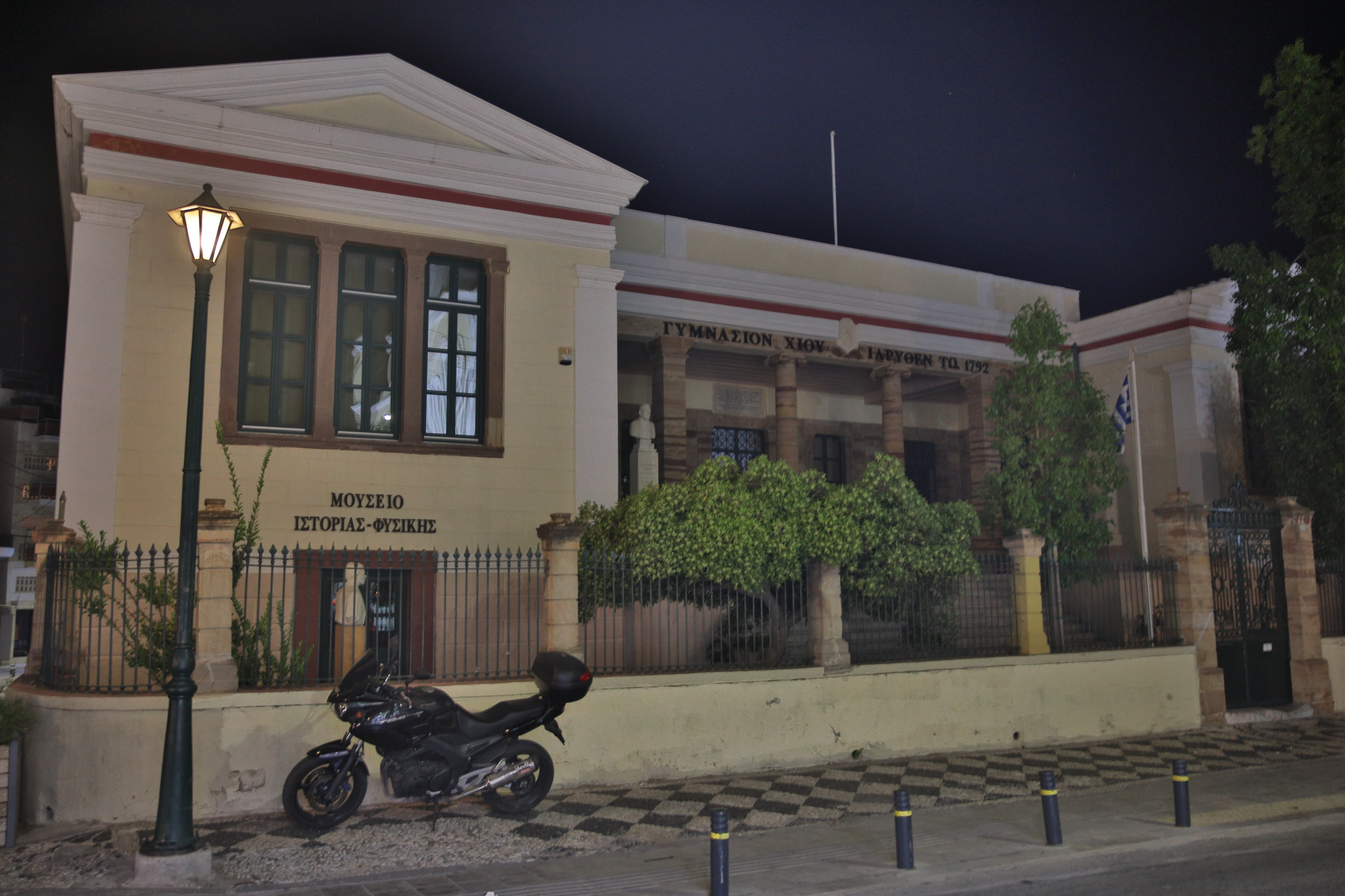 Α΄ Γυμνάσιο - Λύκειο Αρρένων στη Χίο«Α΄ Γυμνάσιο - Λύκειο Αρρένων στη Χίο»